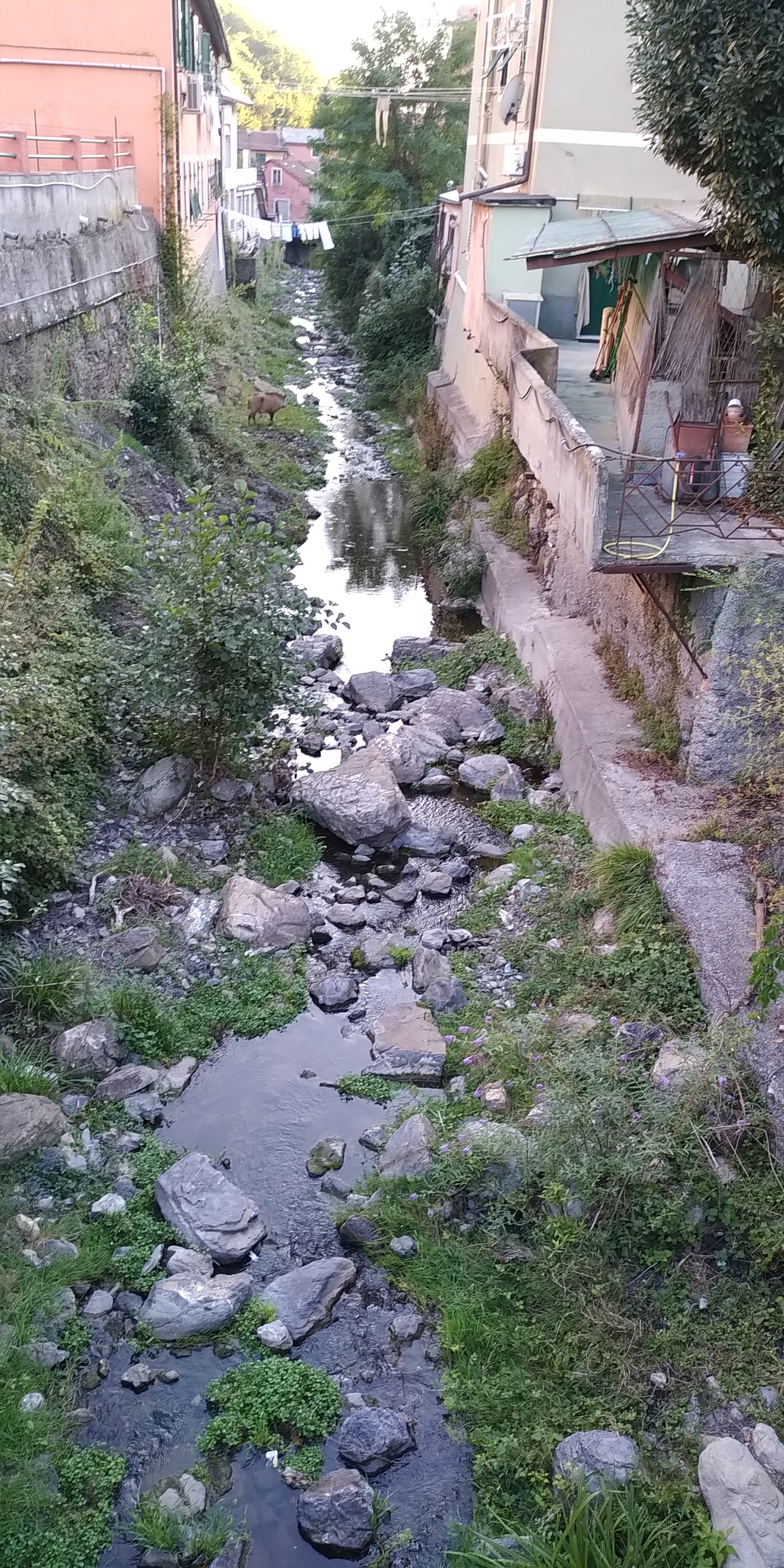 torrente Sturla nell'attraversamento della frazione San Desiderio, comune di Genova